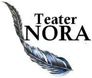 MTÜ Teater NORA logo